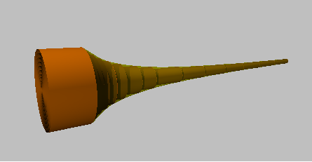 Volume de la trompette de Gabriel par la méthode de Cavalieri - étape 1